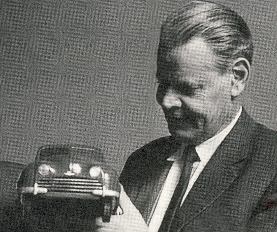 Sixten Sason med en modell av SAAB 92 på industriutställningen i Karlstad 1959